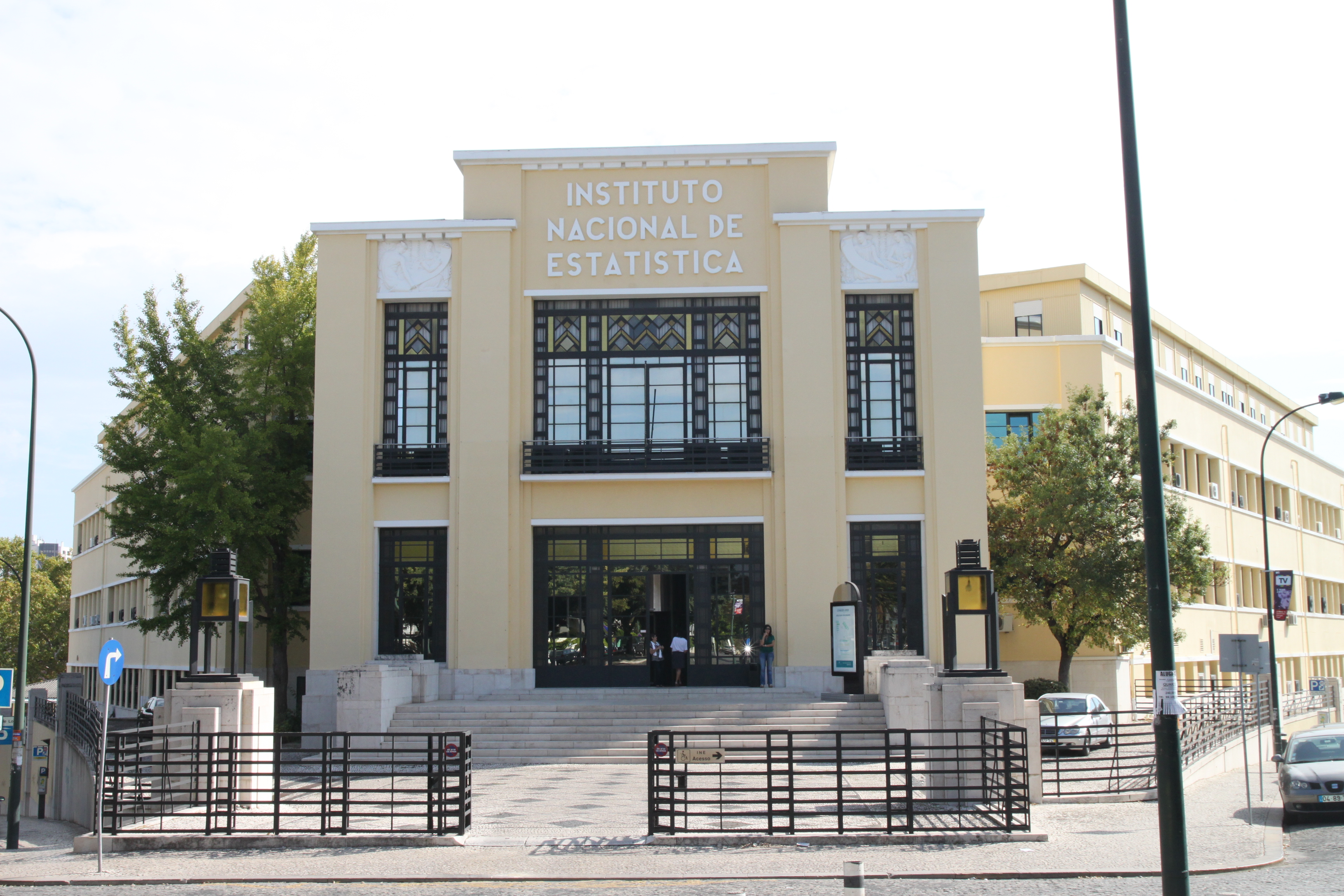 Instituto Nacional de Estatística This file was uploaded for Wiki Loves Monuments in Portugal with the unique identifier 97007770.